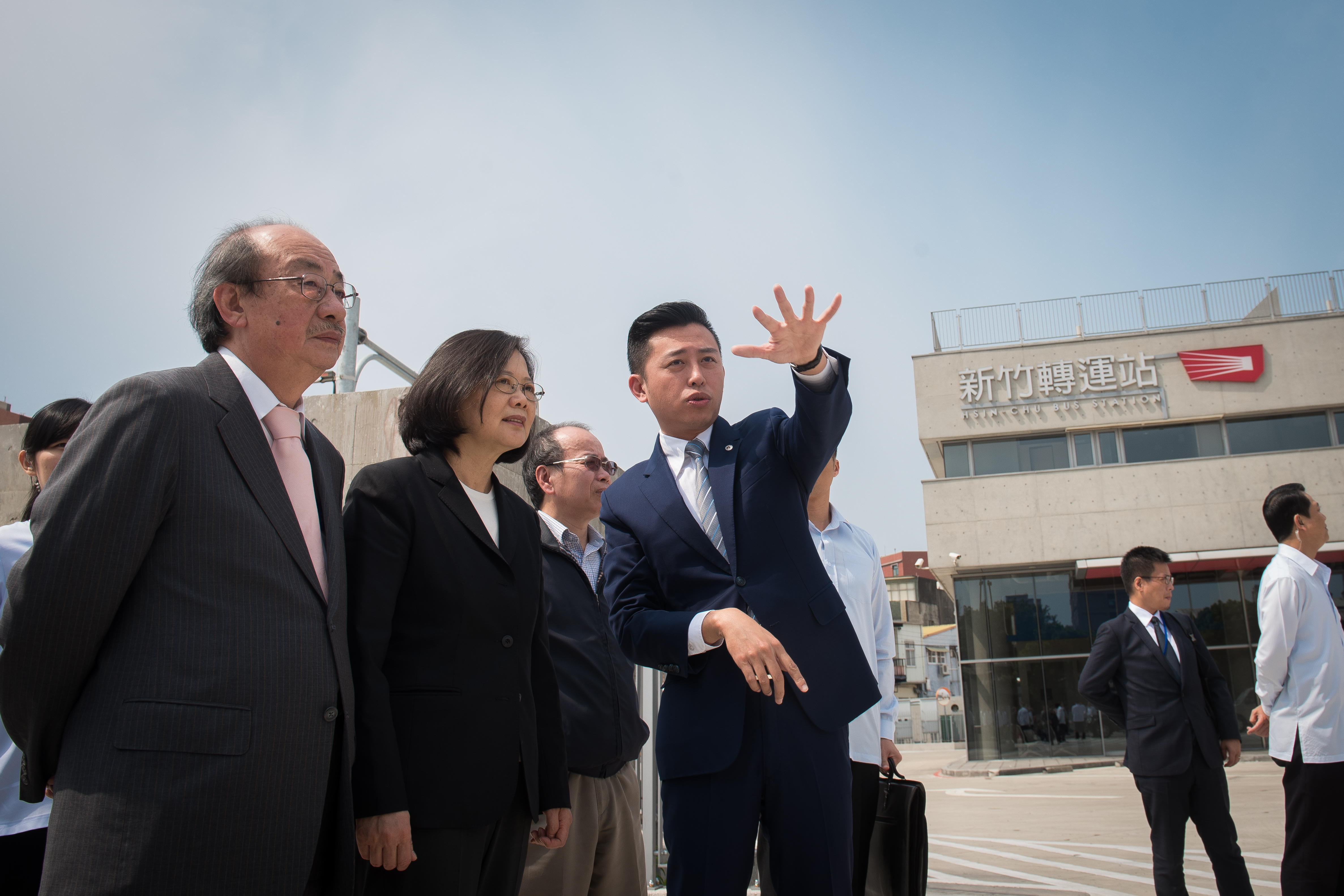 民主進步黨立法院黨團總召集人柯建銘、中華民國總統蔡英文、新竹市市長林智堅在新竹轉運站前視察「新竹大車站及新竹輕軌計畫」。